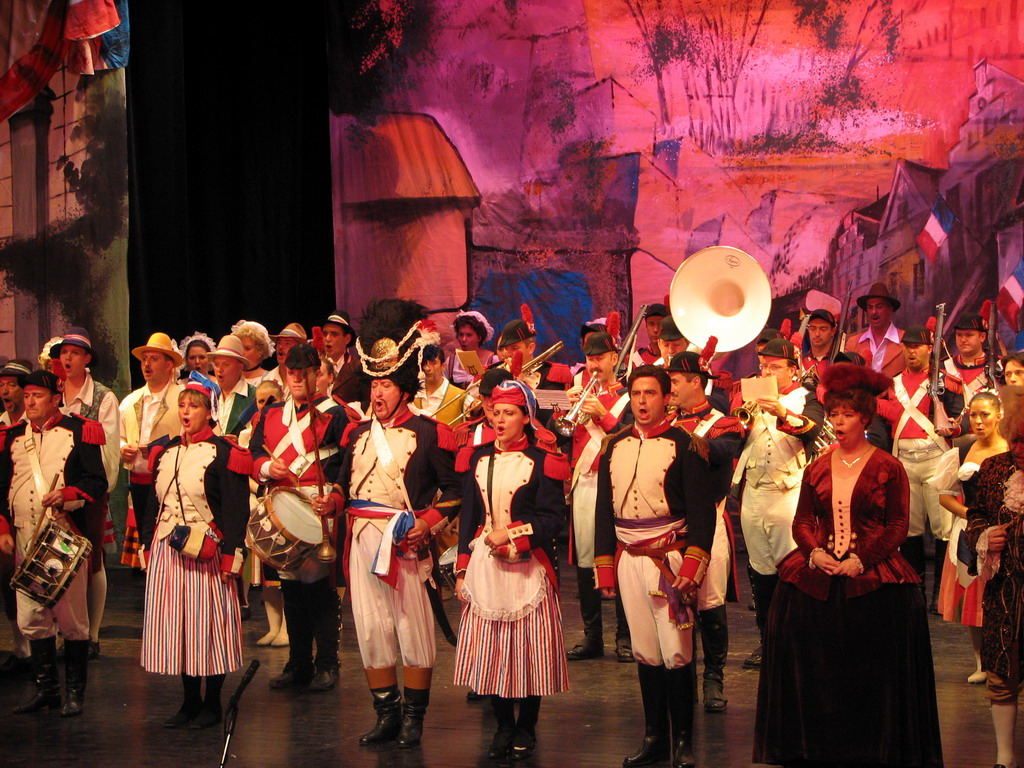 Le final de "La fille du tambour major" de Jacques Offenbach, par la troupe "le Matelots de la Dendre", le 3 septembre 2006, à Ath. Photo personnelle libre de droits